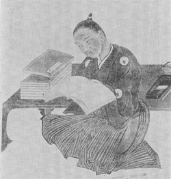 後藤艮山（1659-1733） 江戸時代の医家